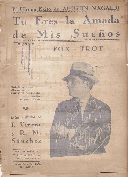 Tapa de la Partitura